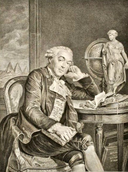 Juste Chevillet (1729–1802) nach Louis-Roland Trinquesse (um 1745–gegen 1800): João Carlos de Bragança e Ligne de Sousa Tavares Mascarenhas da Silva, 2. Herzog von Lafões, Infant von Portugal (1719–1806).